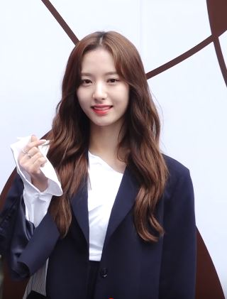 그룹 '우주소녀(보나, 설아)'가 21일 오후 서울 중구 동대문디자인플라자(DDP)에서 열린 '2019F/W 서울패션위크' 유저 컬렉션에 참석했다.